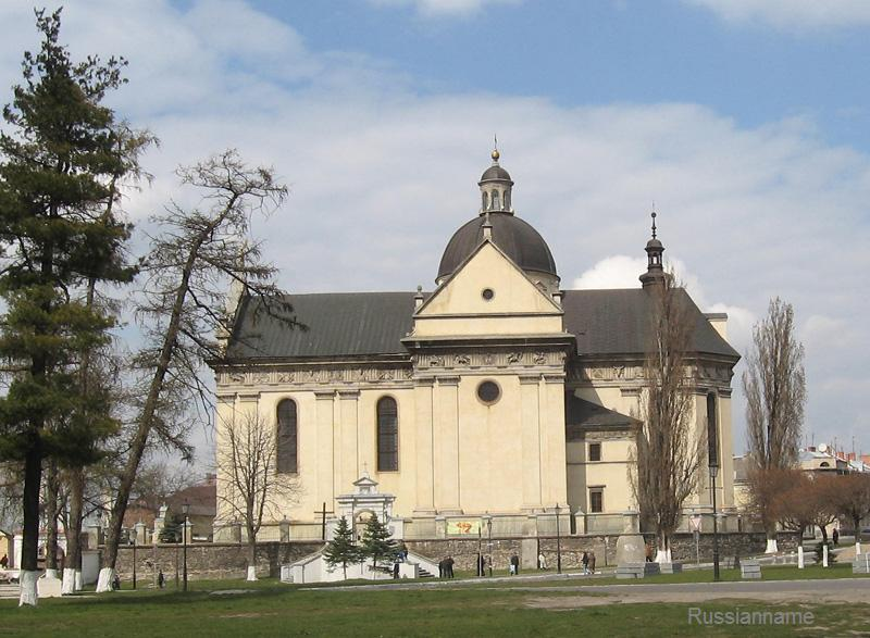 Костел Святого Лаврентия в Жолкве